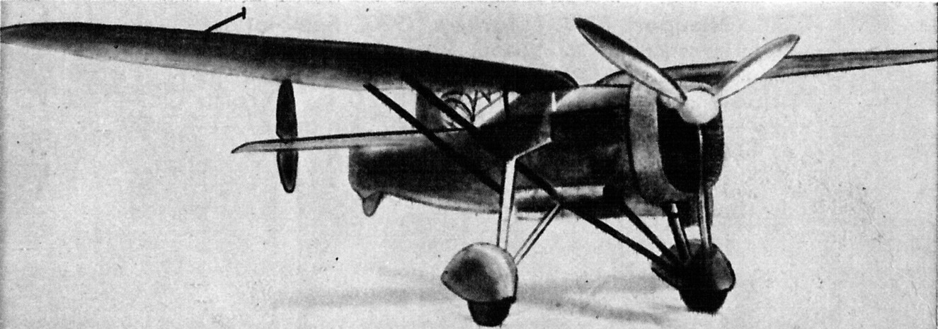 Francuski samolot myśliwski ANF Les Mureaux 180.